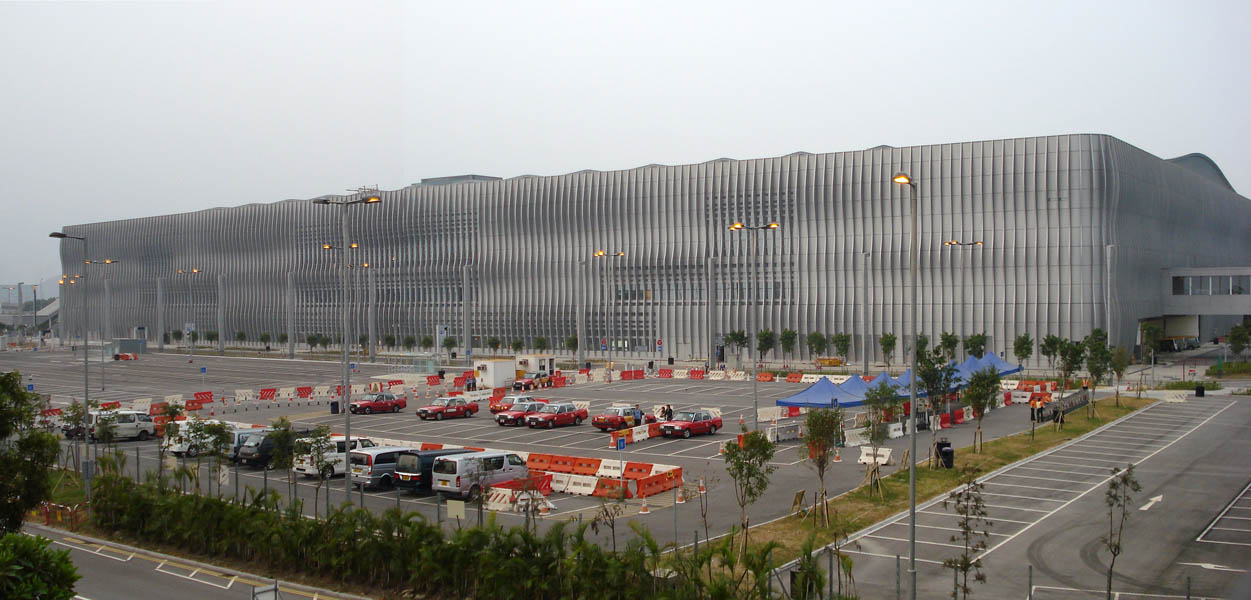 T2, Hong Kong Airport